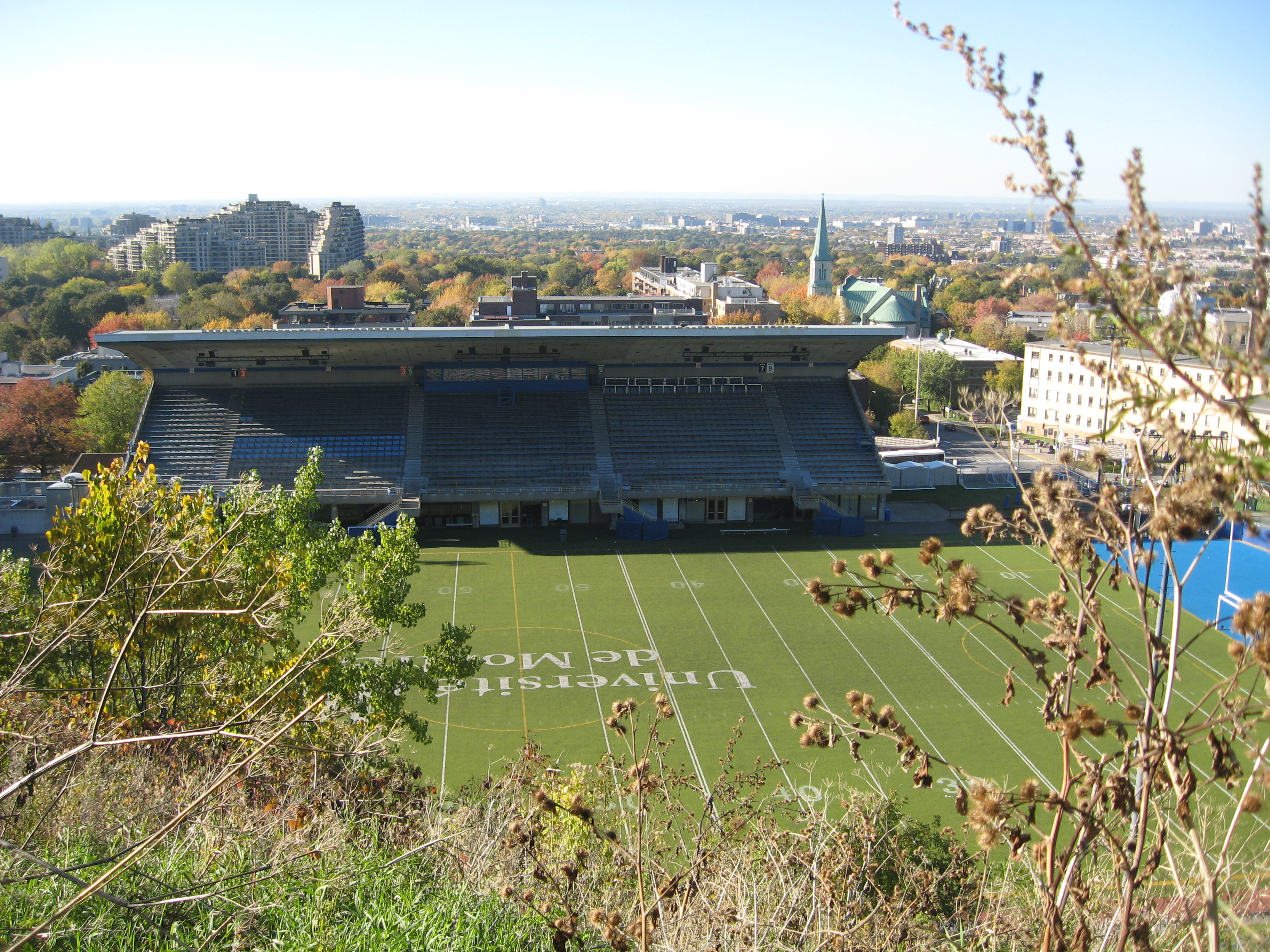 Centre sportif de l'Université de Montréal (CEPSUM)